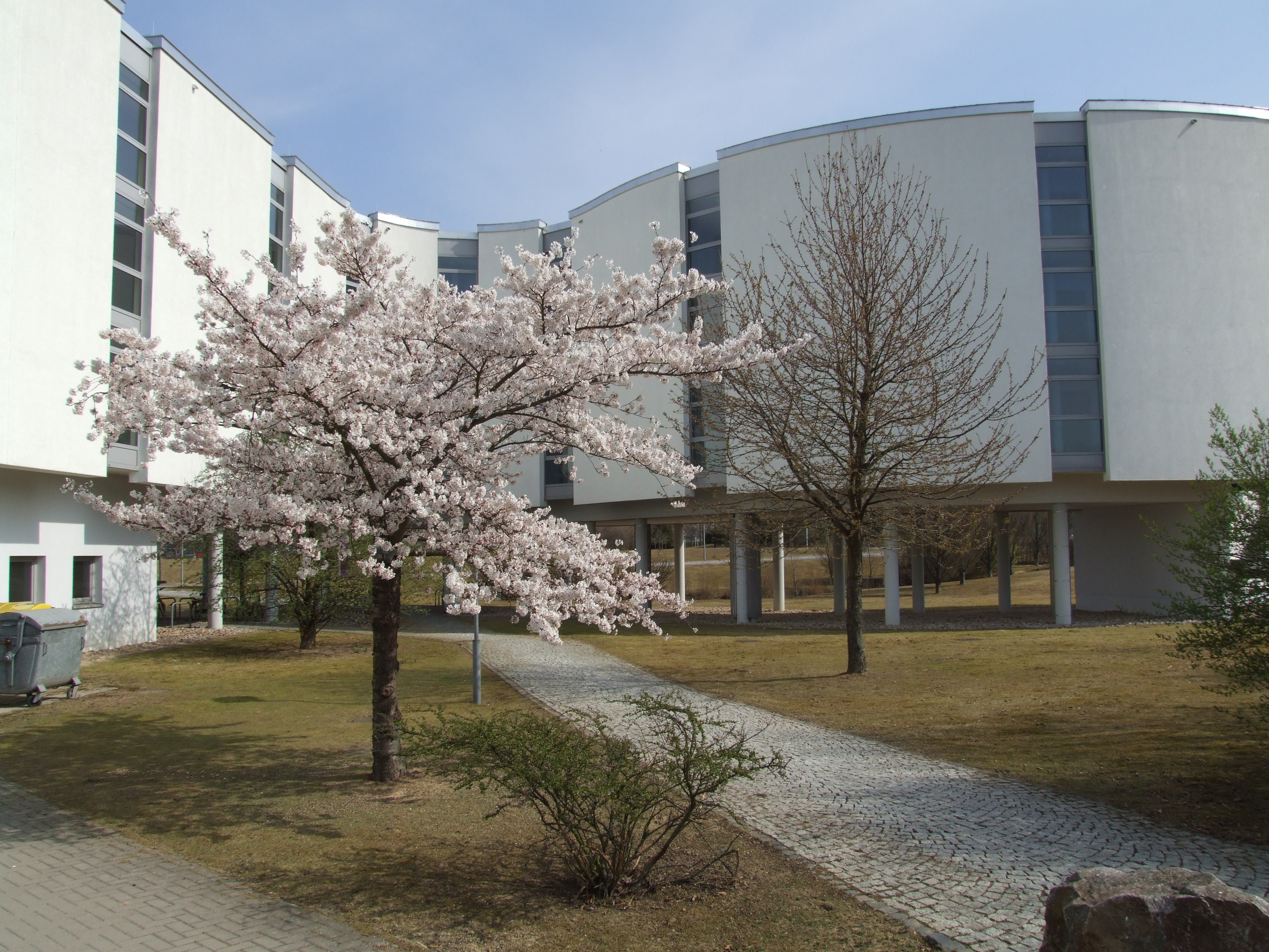 Universität Speyer, Freiherr-vom-Stein-Str. 2: Gästehaus Otto Mayer - Blick von der Nordseite des westlich gelegenen Parkplatzes.